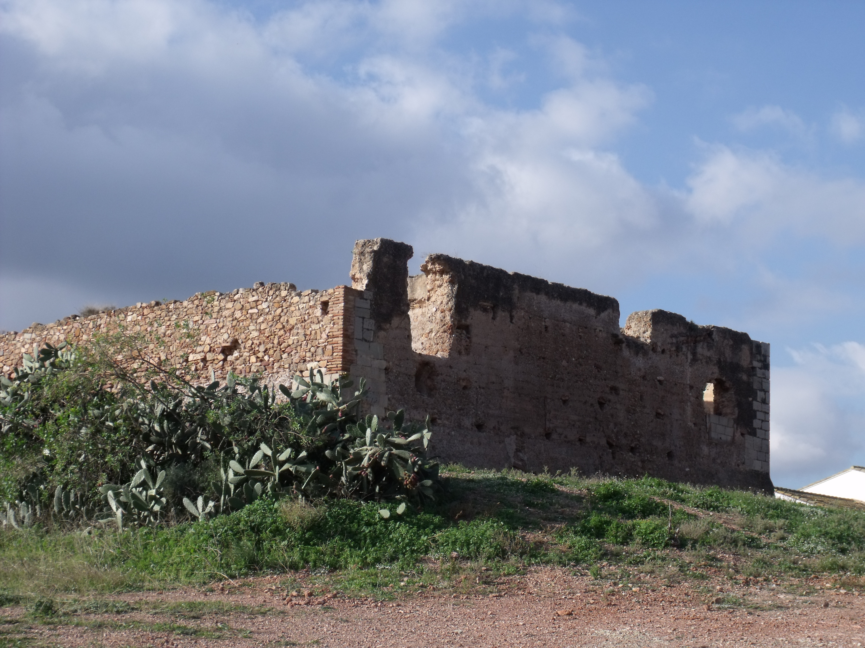 Castillo de Petrés, España.